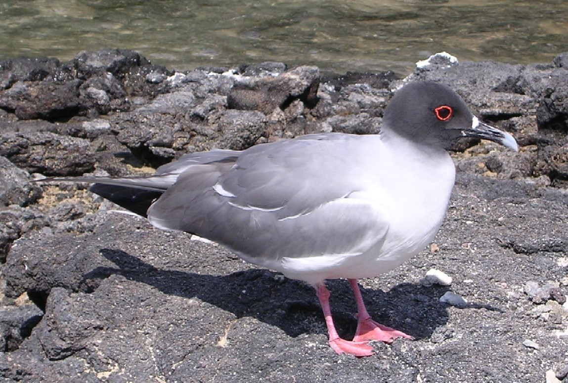 A swallow-tailed gull (Creagrus furcatus) in the Galápagos Islands (ca: Gavina de cua bifurcada; es: Gaviota tijereta o de cola bifurcada)